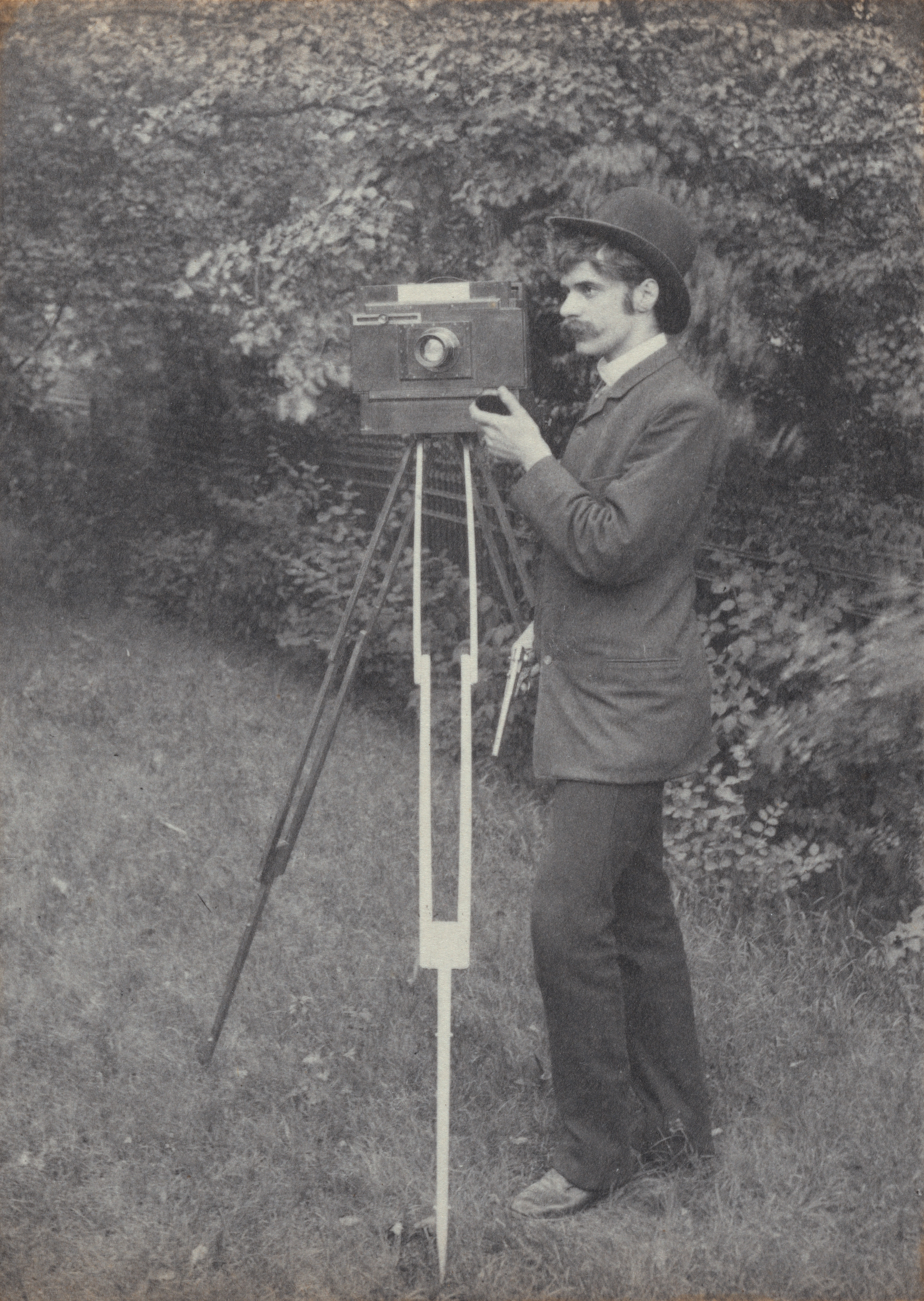 Freienwalde a.O.